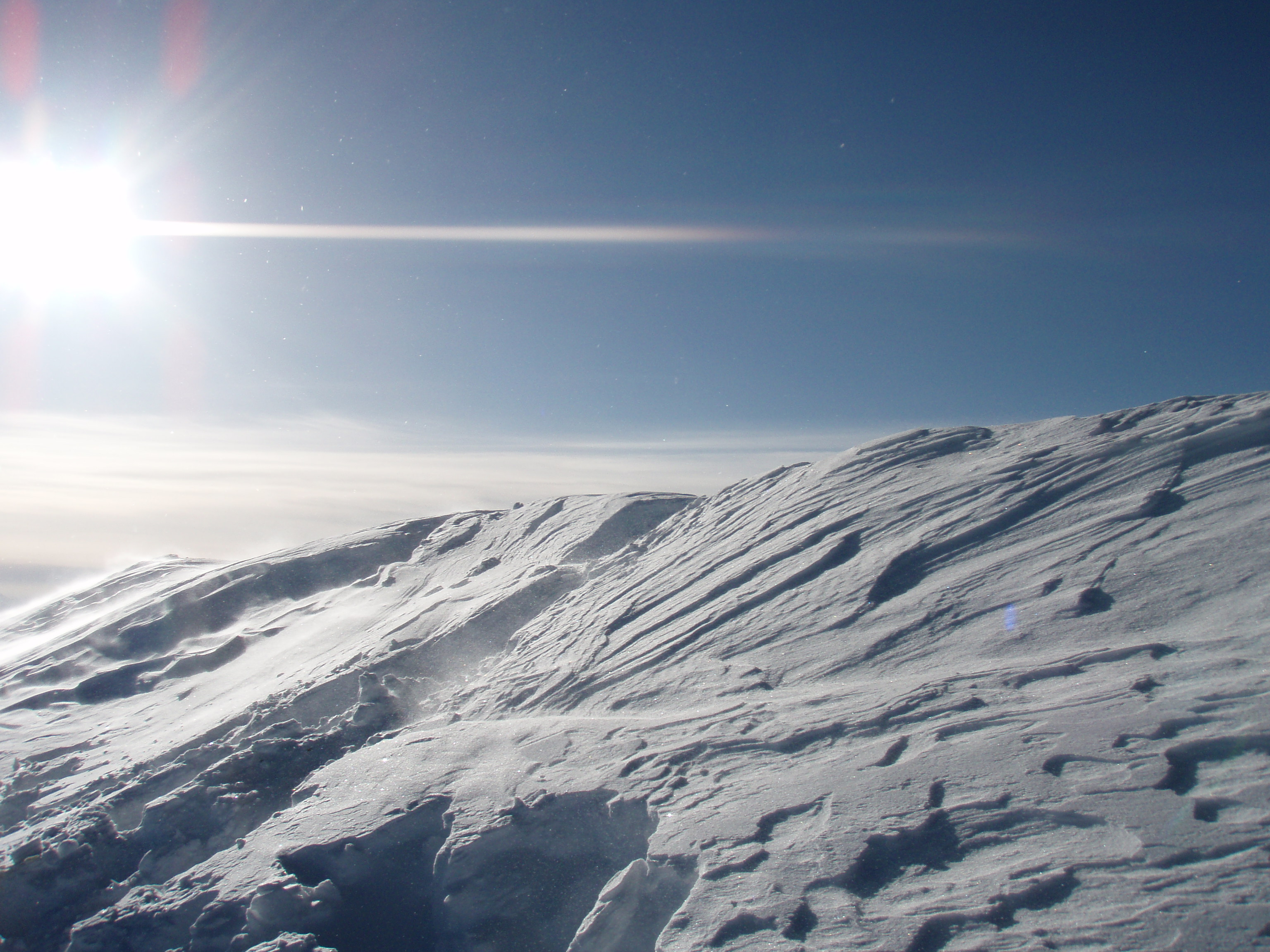 Sommet du Mont Blanc, Saint-Gervais-les-Bains, Haute-Savoie, France.